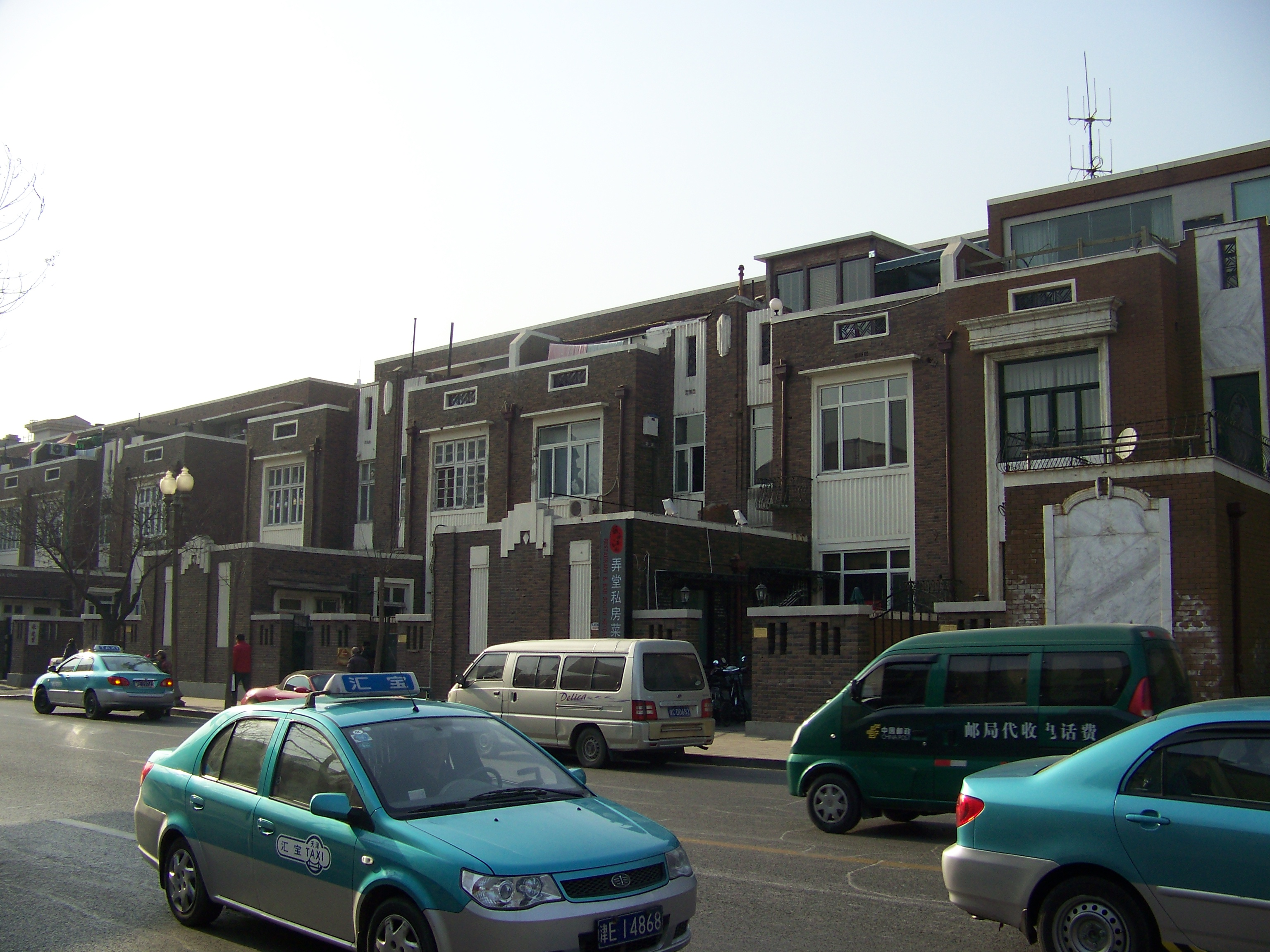 五大道